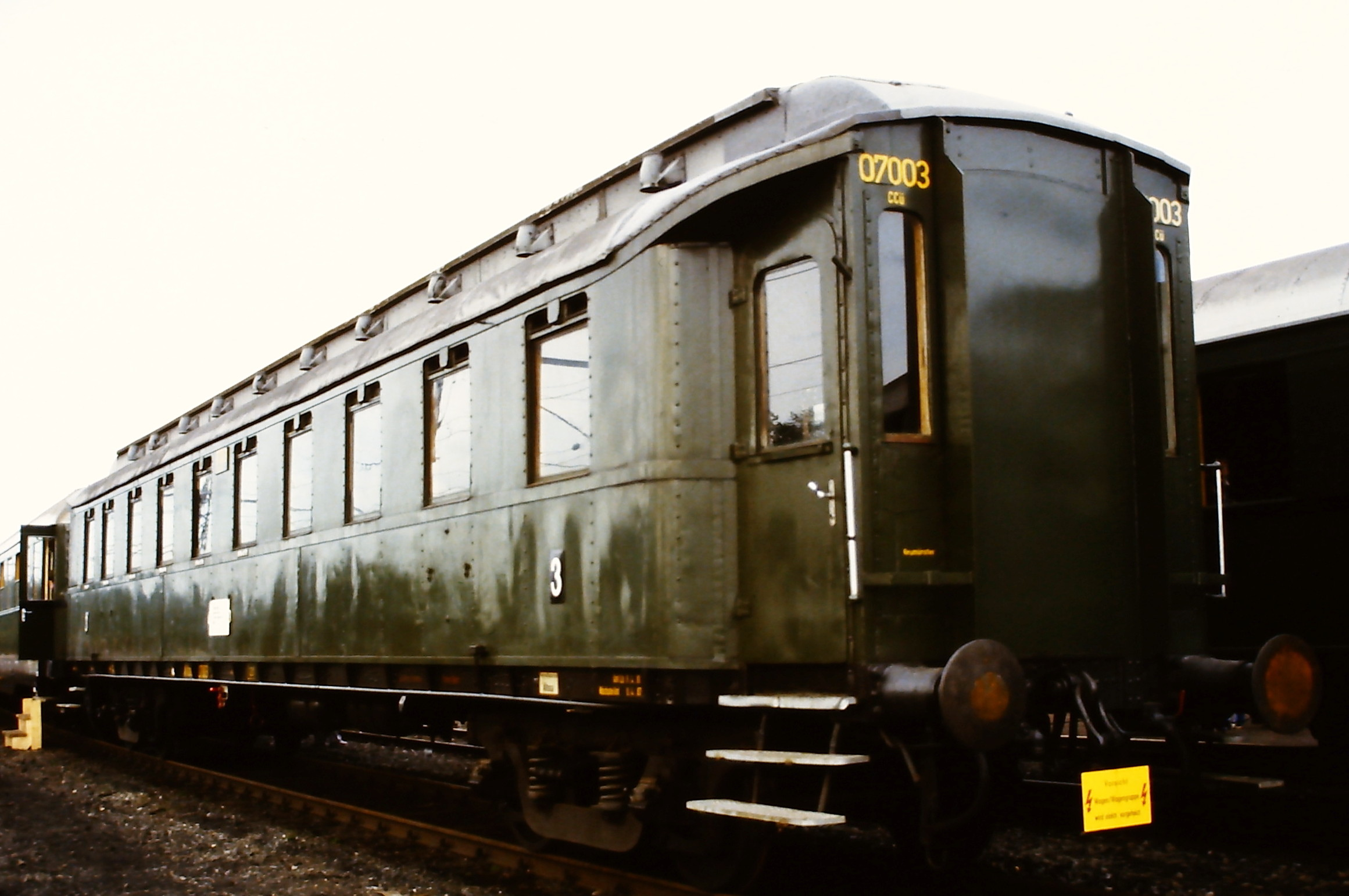 KPEV Schnellzugwagen CCü, ausgestellt auf der Fahrzeugschau 150 Jahre deutsche Eisenbahn" in Bochum-Dahlhausen